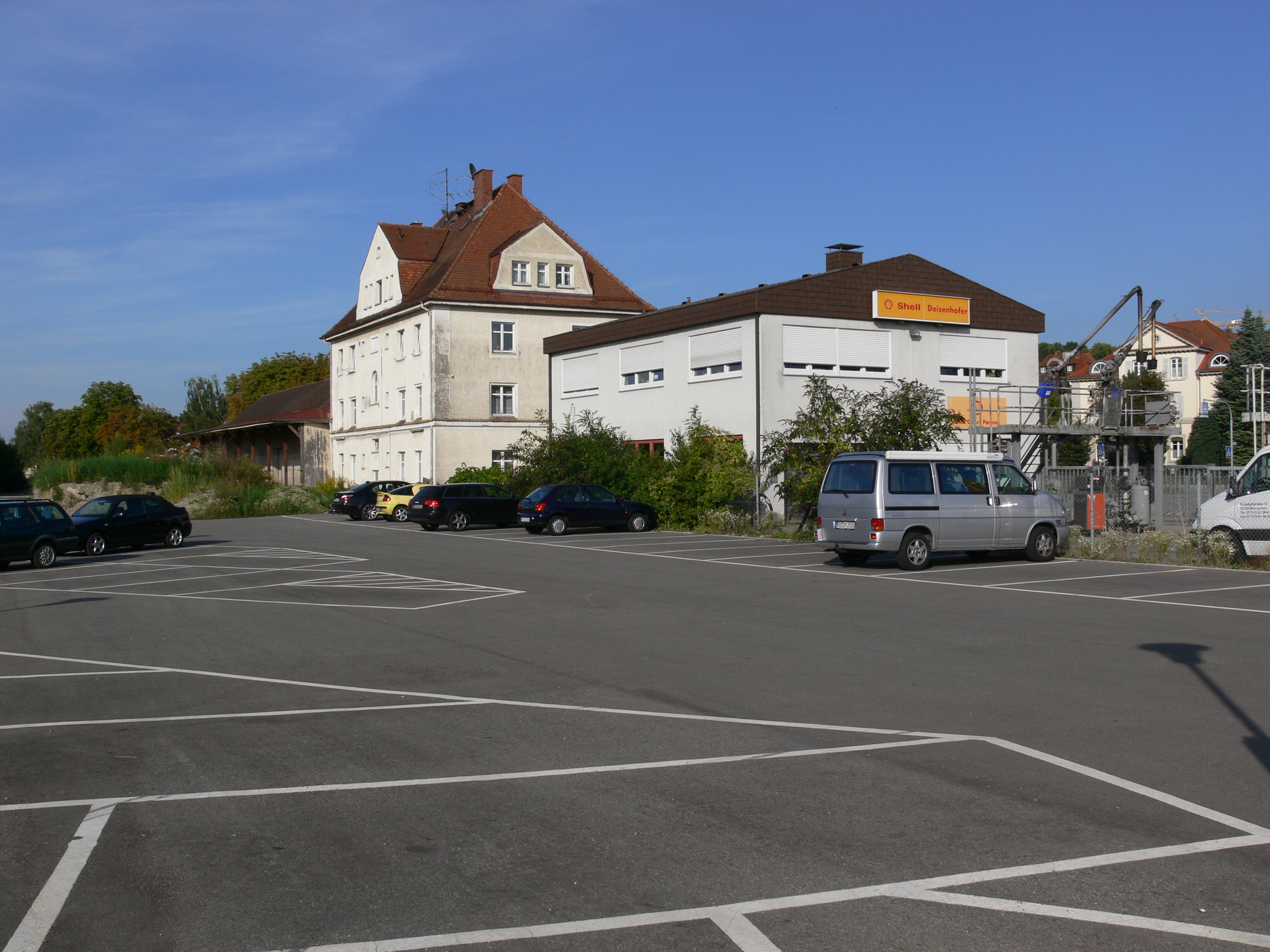 Güterbahnhof in Weingarten, Gleisseite